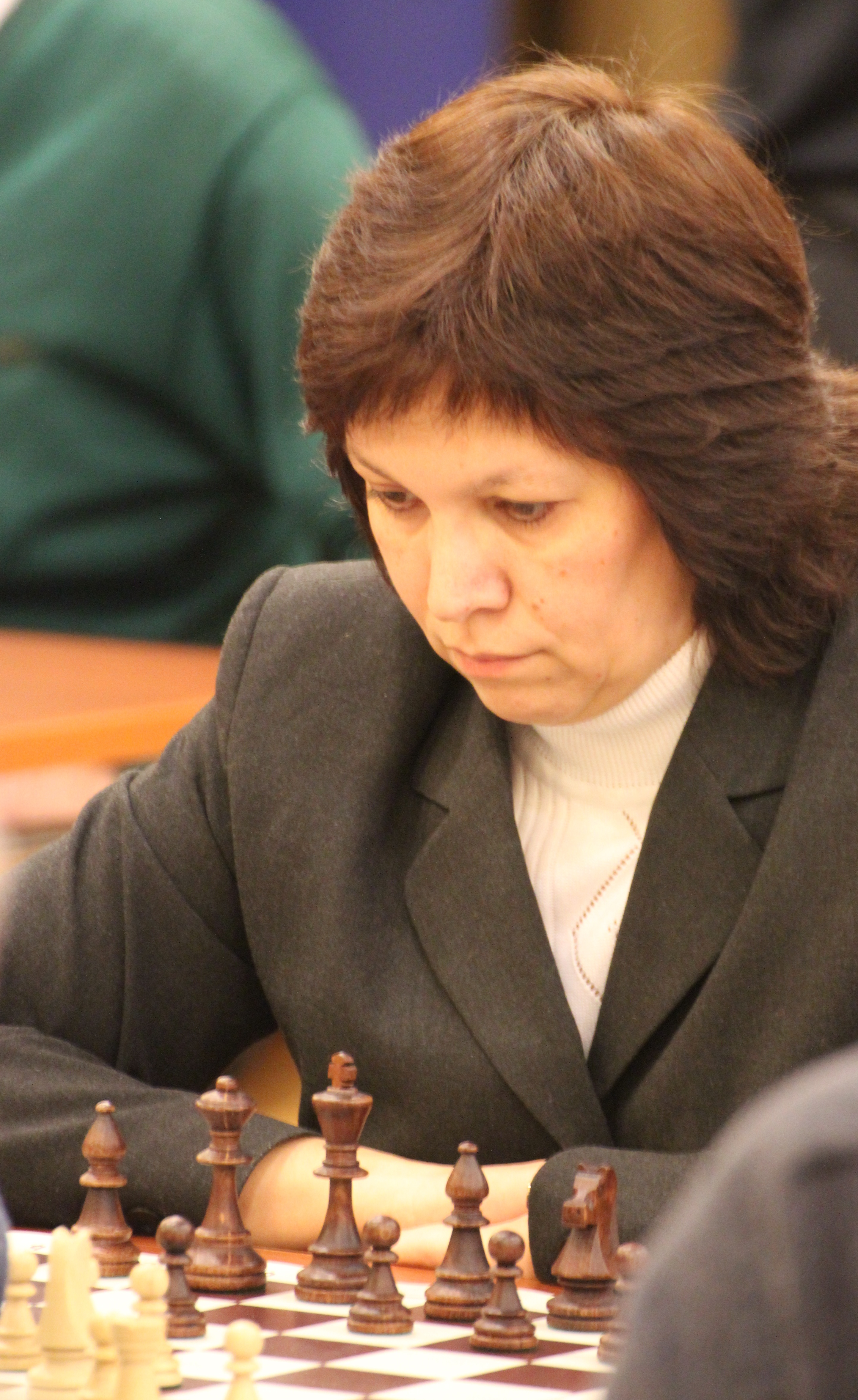 Monika Tsõganova mängimas Paul Kerese mälestusturniiril.